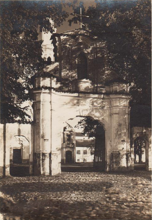 Беларуская (тарашкевіца): Глыбокае (Hłybokaje), пляц Рынак (plac Rynak). Касьцёл Унебаўзяцьця Найсьвяцейшай Панны Марыі і кляштар кармэлітаў, брама